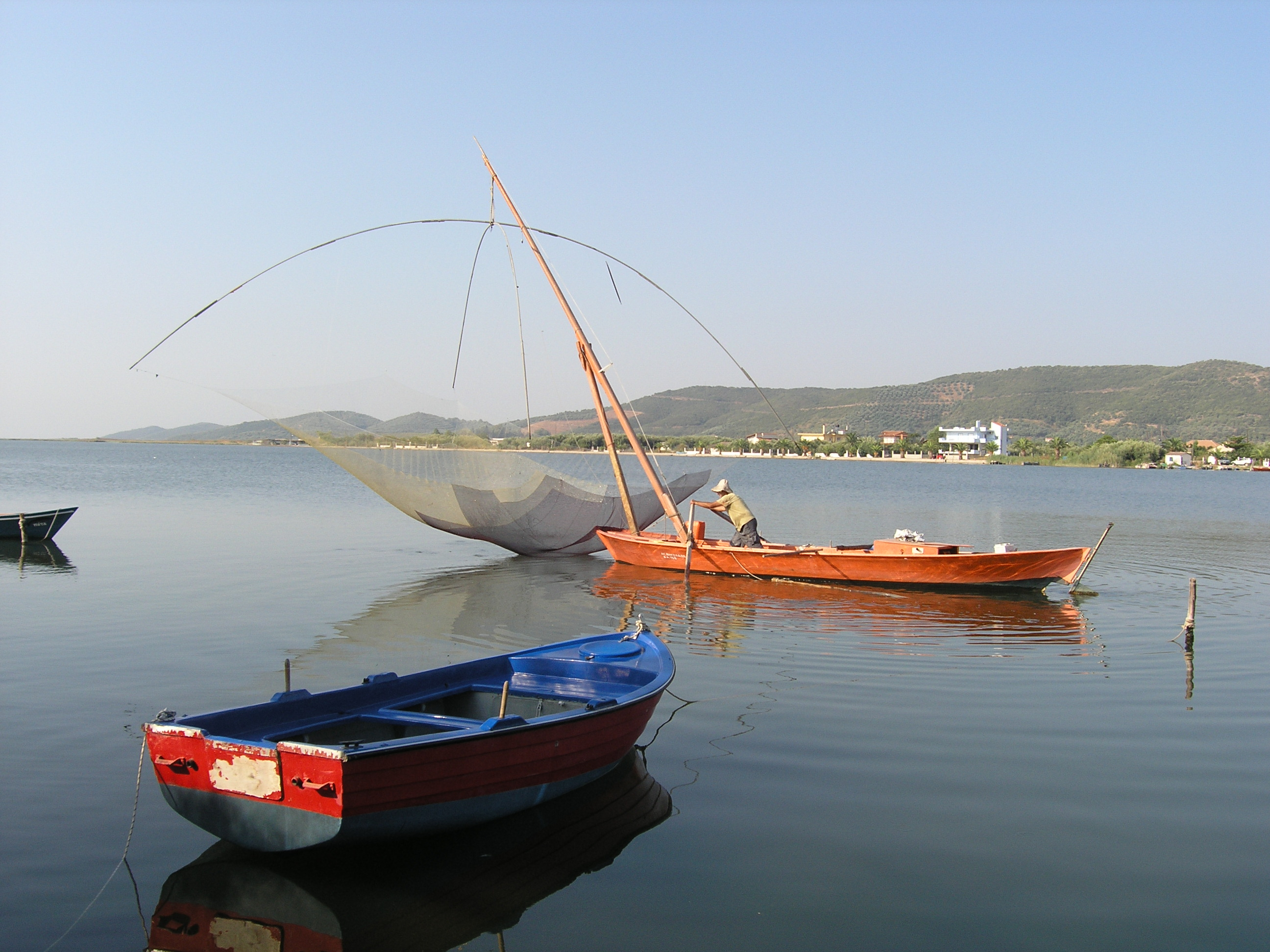 Fischer in Aitoliko